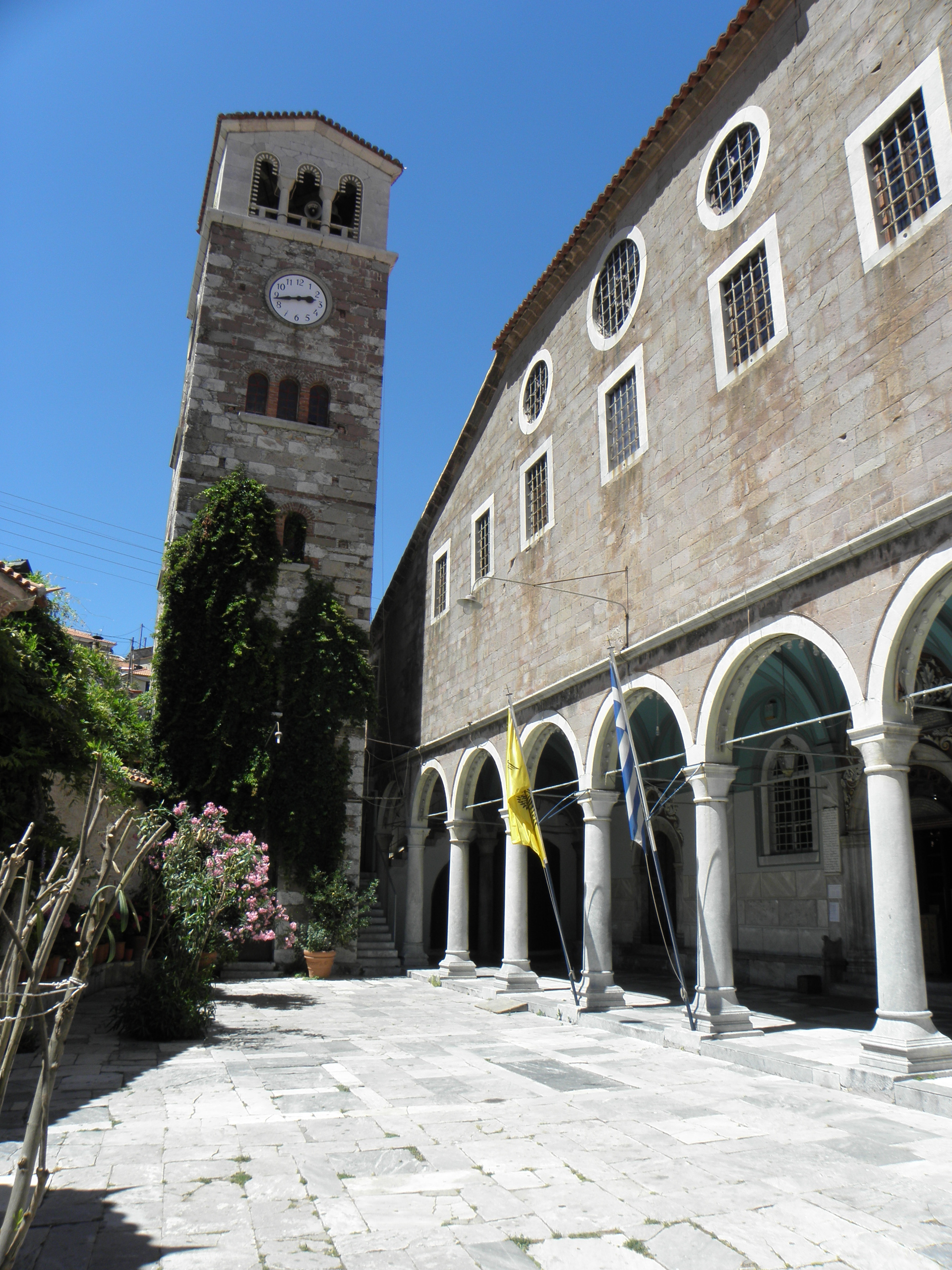 Agiassos, Lesbos